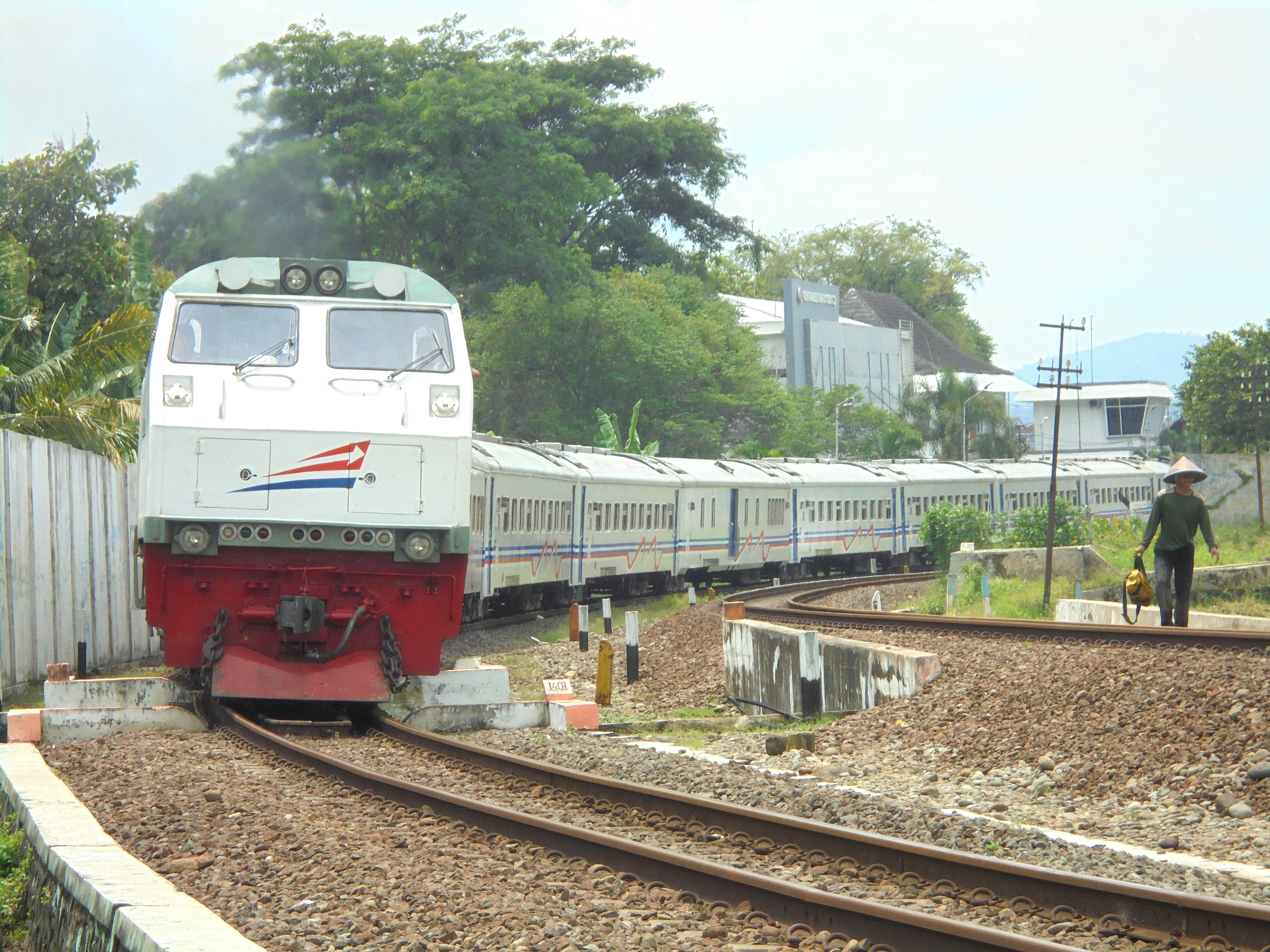 Kereta api Jaka Tingkir saat meninggalkan Stasiun Purwokerto